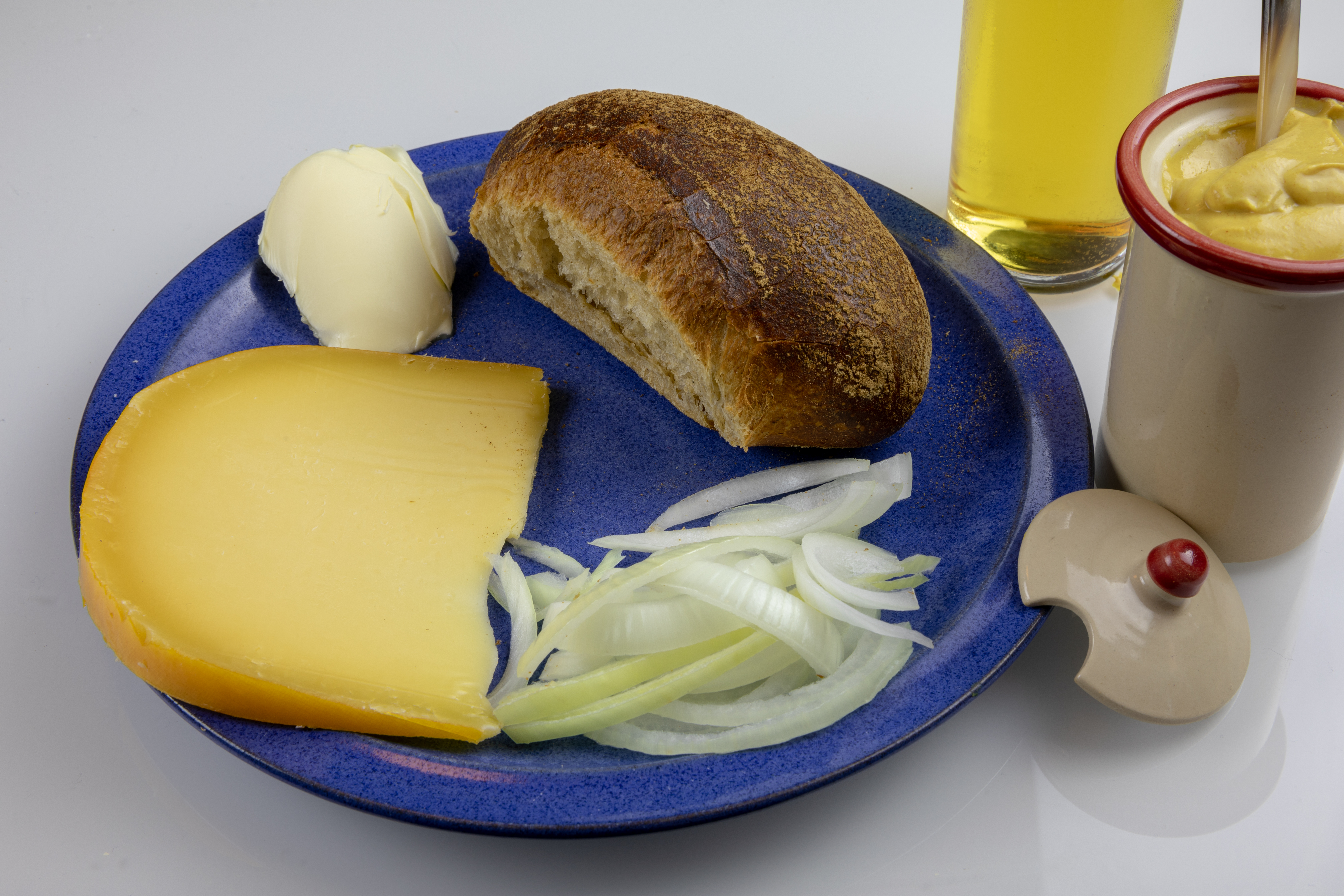 Halve Hahn (Röggelchen, Zwiebeln, Senf, mittelalter Holländer). Röggelchen eine Hälfte